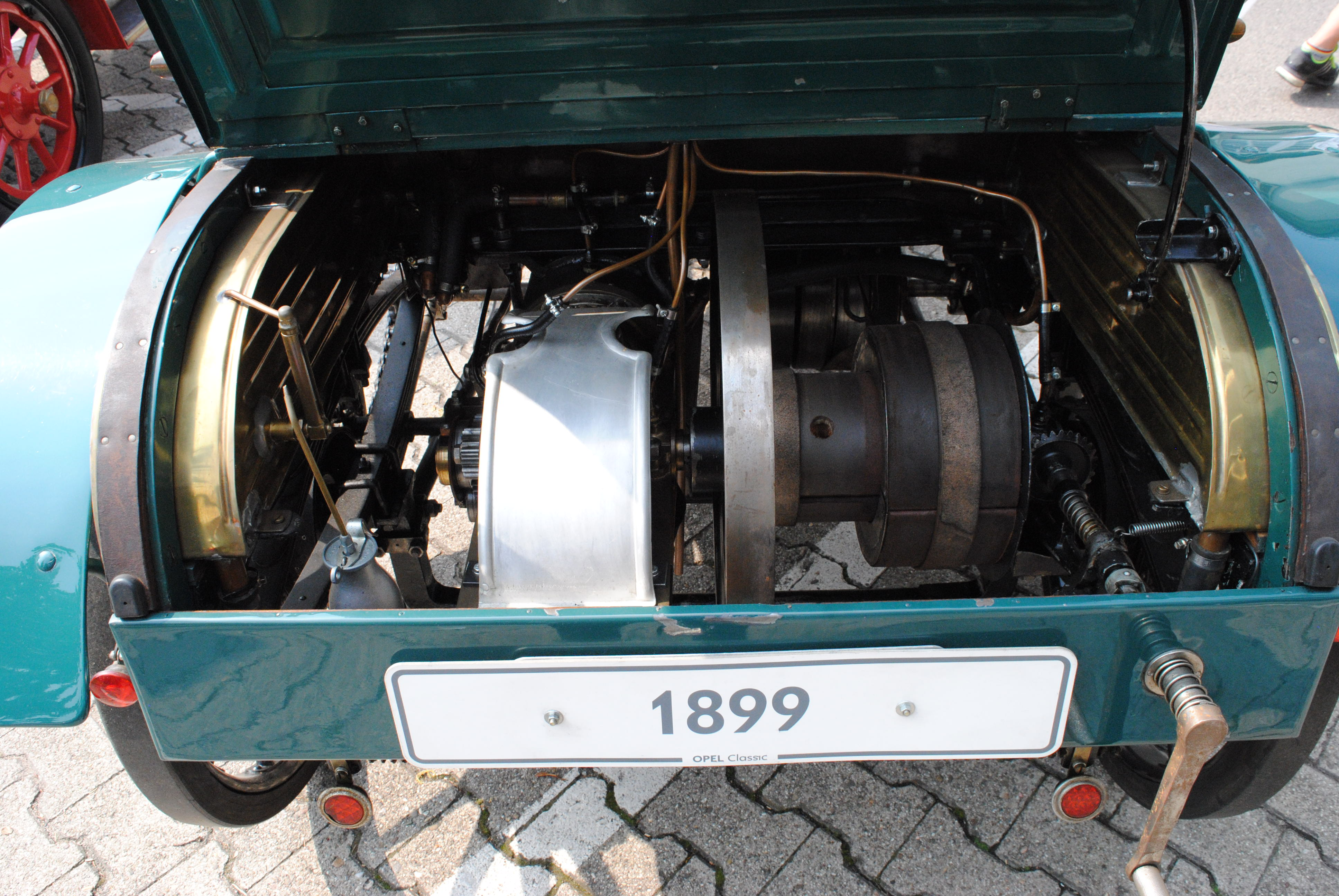 Opel Patentmotorwagen („System Lutzmann“) auf dem Klassikertreffen Rüsselsheim 2017.